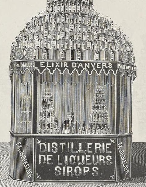 Exposition Universelle d'Anvers